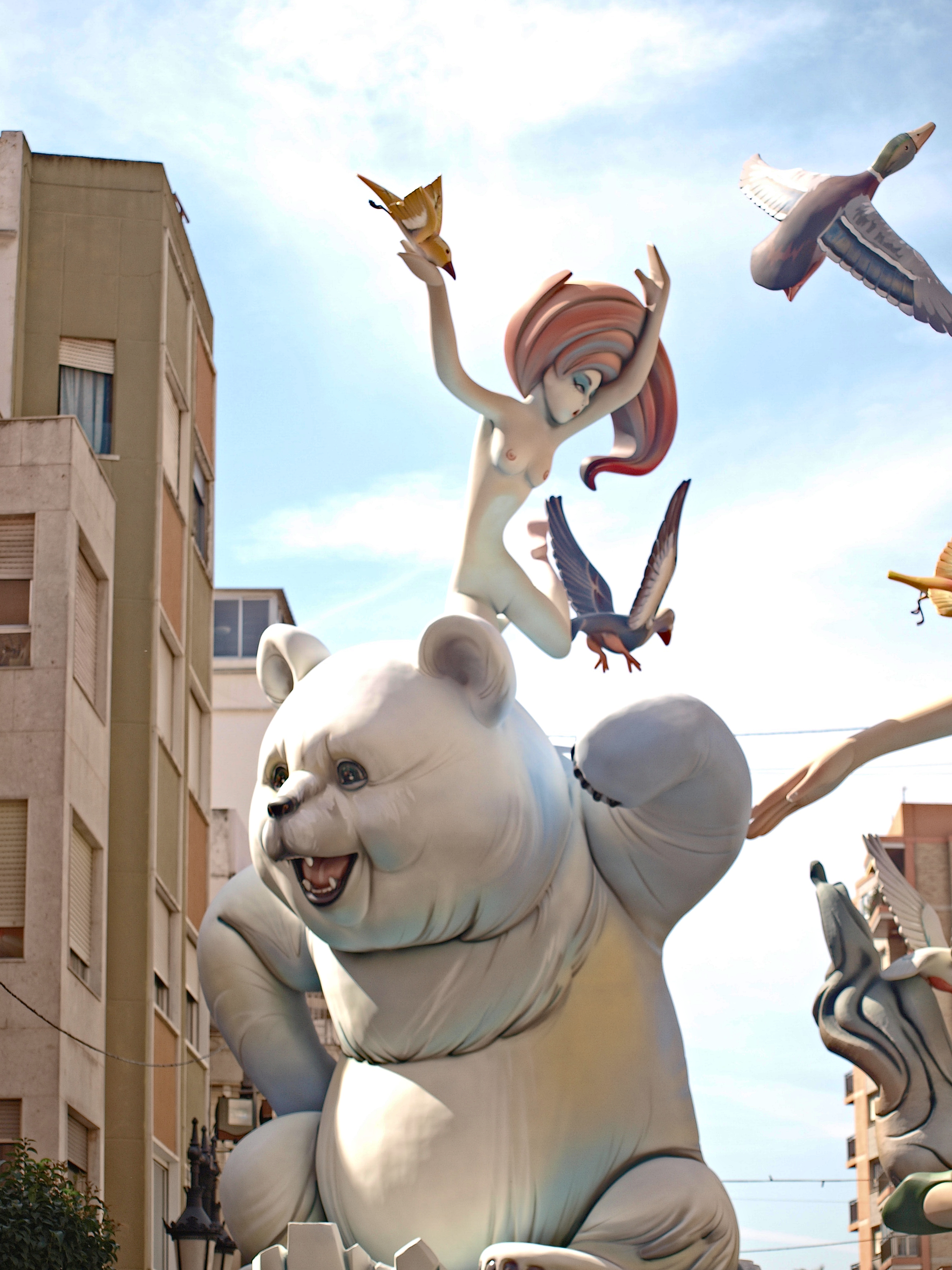 monument de la Falla Passeig-Mercat de Cullera, Tercer Premi de la Secció Especial de 2014 This is a photography of a Folklore festival in Spain (Wikidata id Q23663326).